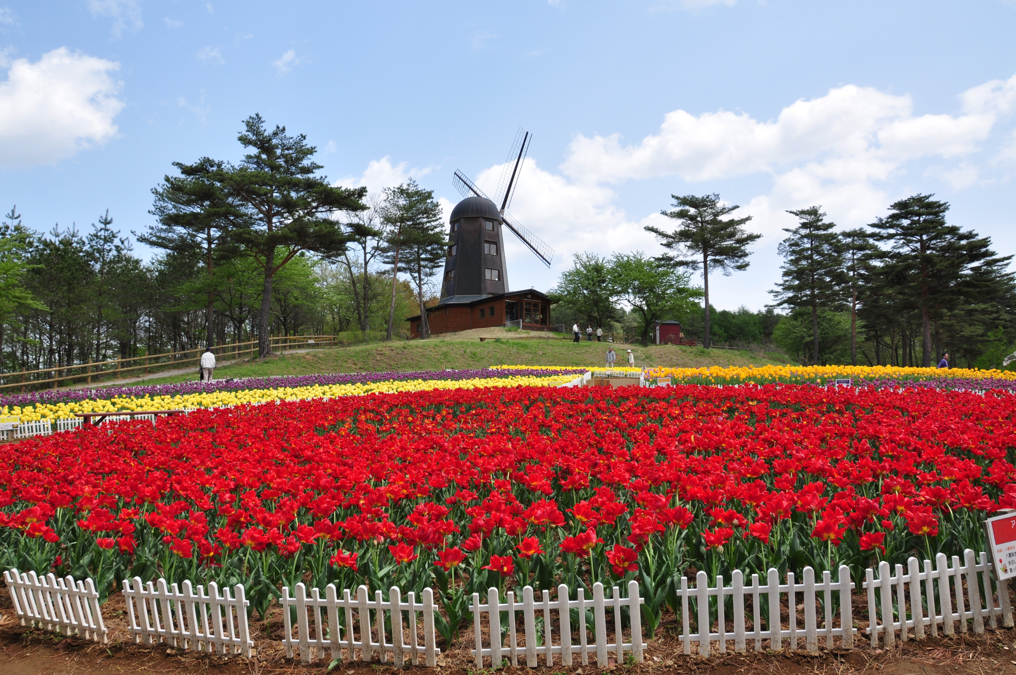 軽米フォリストパーク